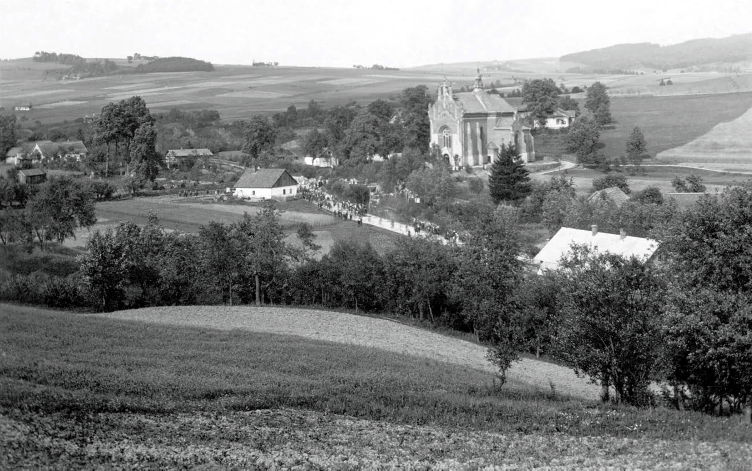 Przyszowa w 1930, widok od południowego zachodu